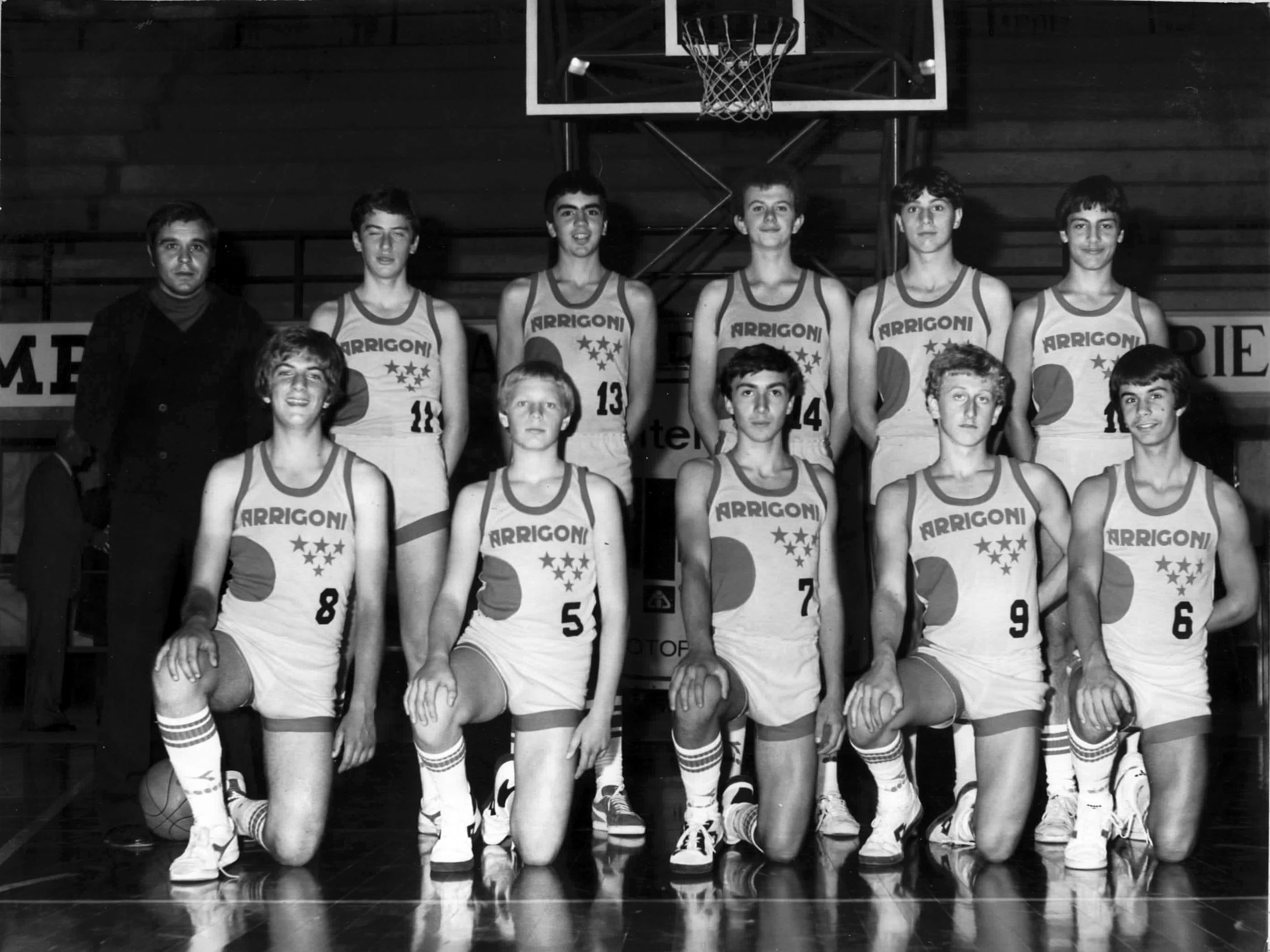 La squadra Campione d'Italia Allievi 1978/79. In alto da sinistra: Sandro Cordoni (allenatore), Ludovico Melchiorri, Luca Colantoni, Maurizio Balducci, Maurizio Faraglia, Marco Pitoni. In basso da sinistra: Fabrizio Dionisi, Giuseppe Cattani, Paolo Campanelli, Fabrizio Luna, Paolo Di Fazi. (Foto scattata a Rieti il 25 ottobre 1978 al Palaloniano, ora PalaSojourner, prima dell'amichevole contro la Scavolini Pesaro, squadra vincitrice del titolo italiano Propaganda del 1976/77 e del titolo italiano Ragazzi del 1977/78. Risultato finale dell'amichevole: Arrigoni Rieti - Scavolini Pesaro: 89-71. Il 31 ottobre 1978 si disputò la partita amichevole di ritorno a Pesaro, risultato: Scavolini Pesaro - Arrigoni Rieti 80-85)